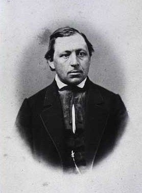 Villads Nielsen Holm (1829-1901), Danish farmer and politician, MP